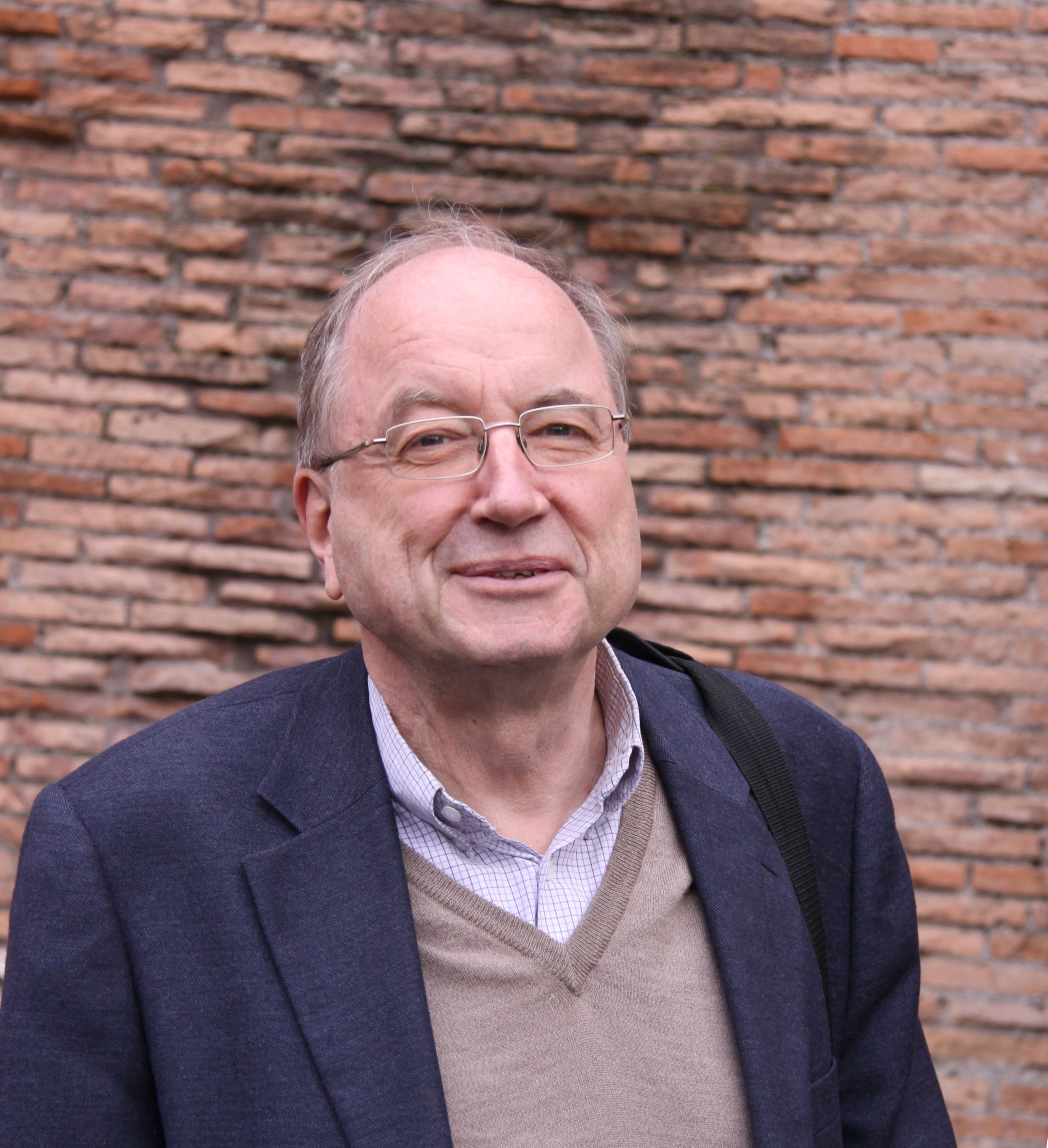 Henner von Hesberg, Erster Direktor des Deutschen Archäologischen Instituts Rom